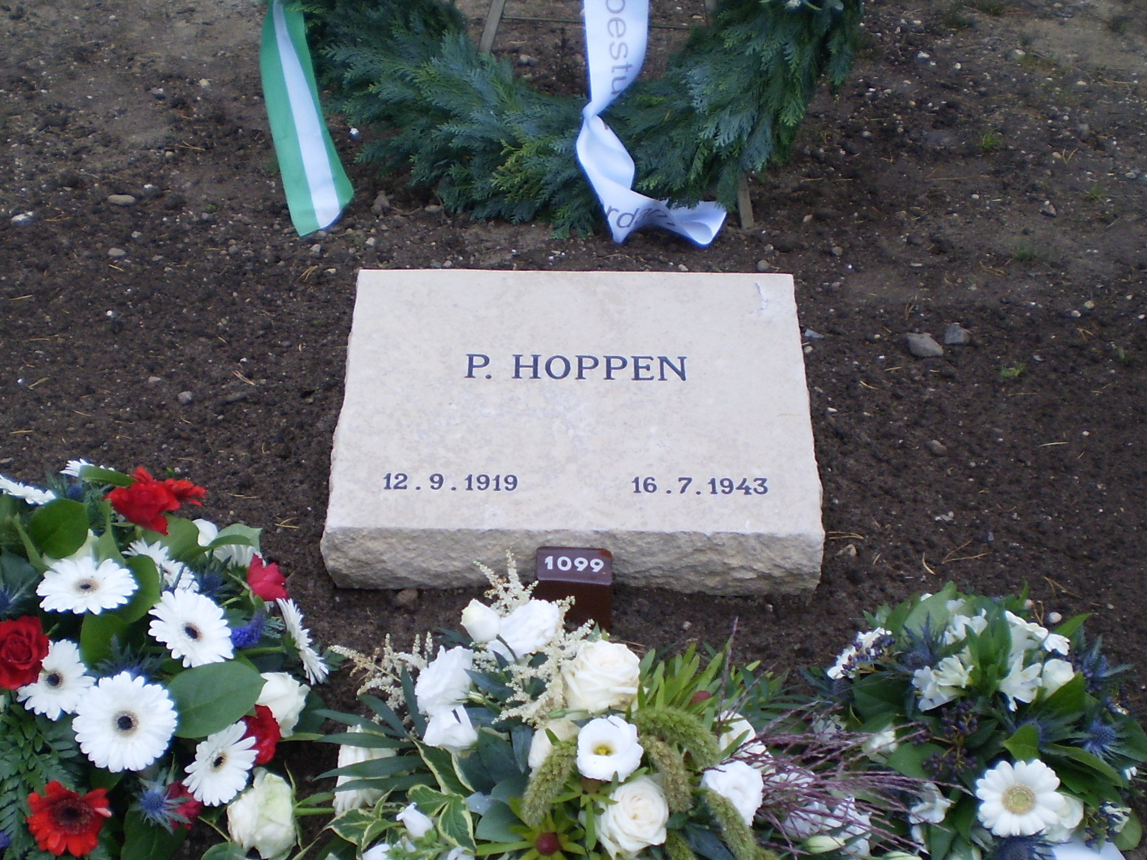 Grafsteen Pieter Hoppen (1919-1943), een door het verzet geliquideerde onderduiker uit de Tweede Wereldoorlog, herbegraven 13 oktober 2010 op het Ereveld Loenen, NL